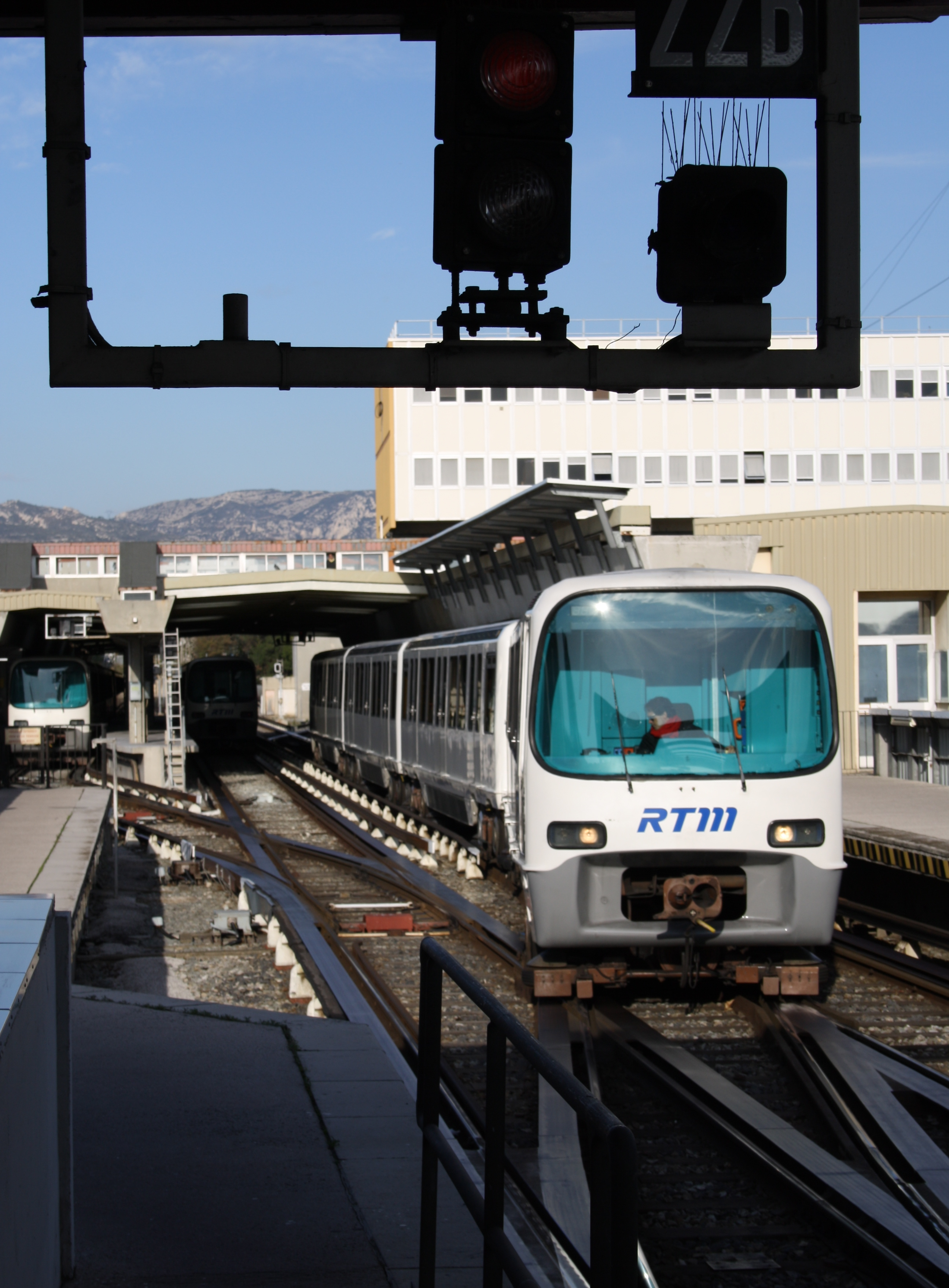 Zug der Métro Marseille bei der Ausfahrt aus dem Betriebshof der Linie 1